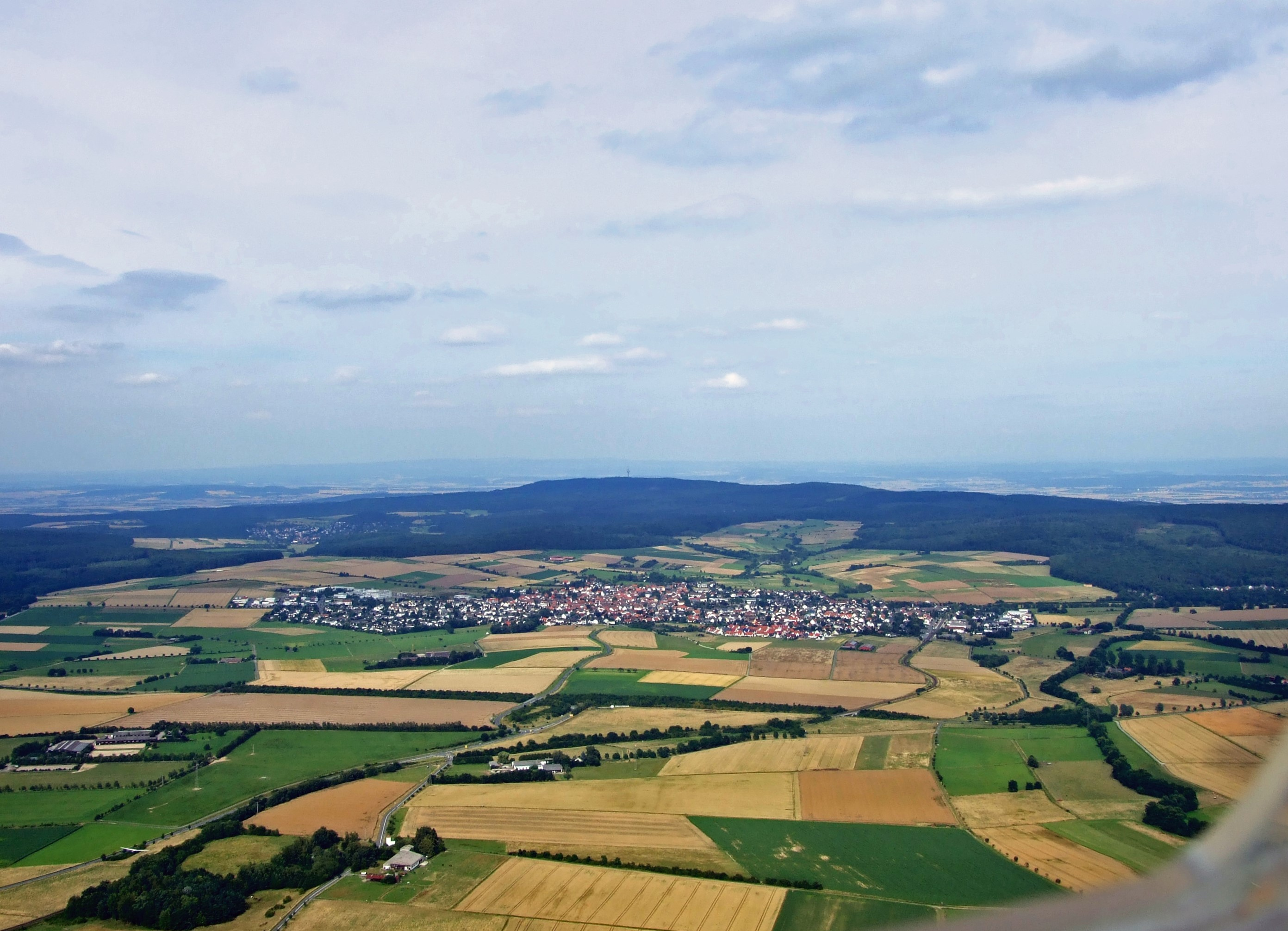 Wehrheim im Taunus, Luftaufnahme aus Westen